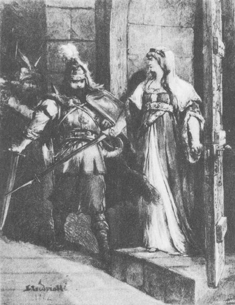 Беларуская (тарашкевіца): Вялікі князь Трайдзень (Trajdzień). Сустрэча з будучай жонкай, мазавецкай князёўнай Ганнай